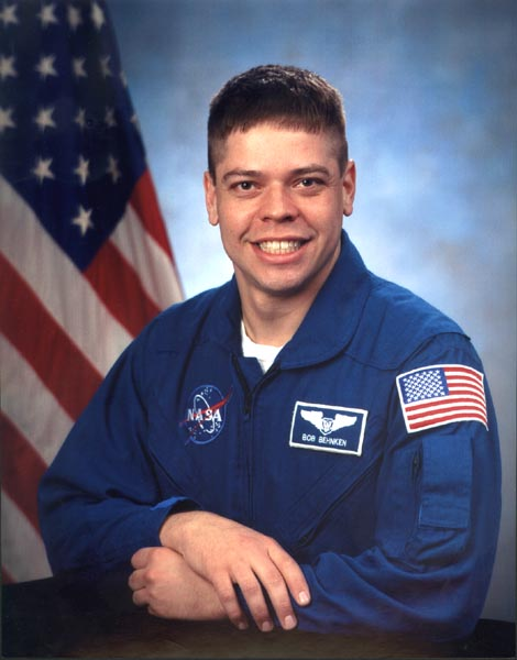 Robert L. Behnken